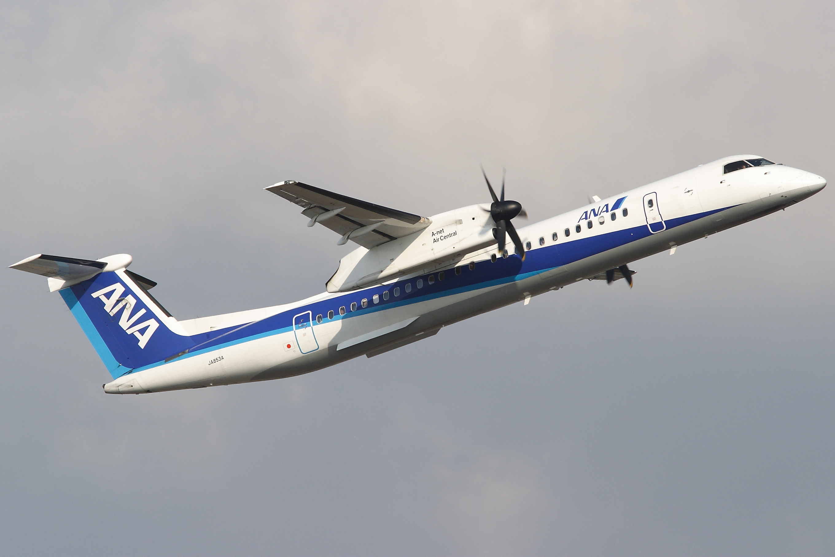 エアーニッポンネットワーク ボンバルディア DHC-8-400 福岡空港